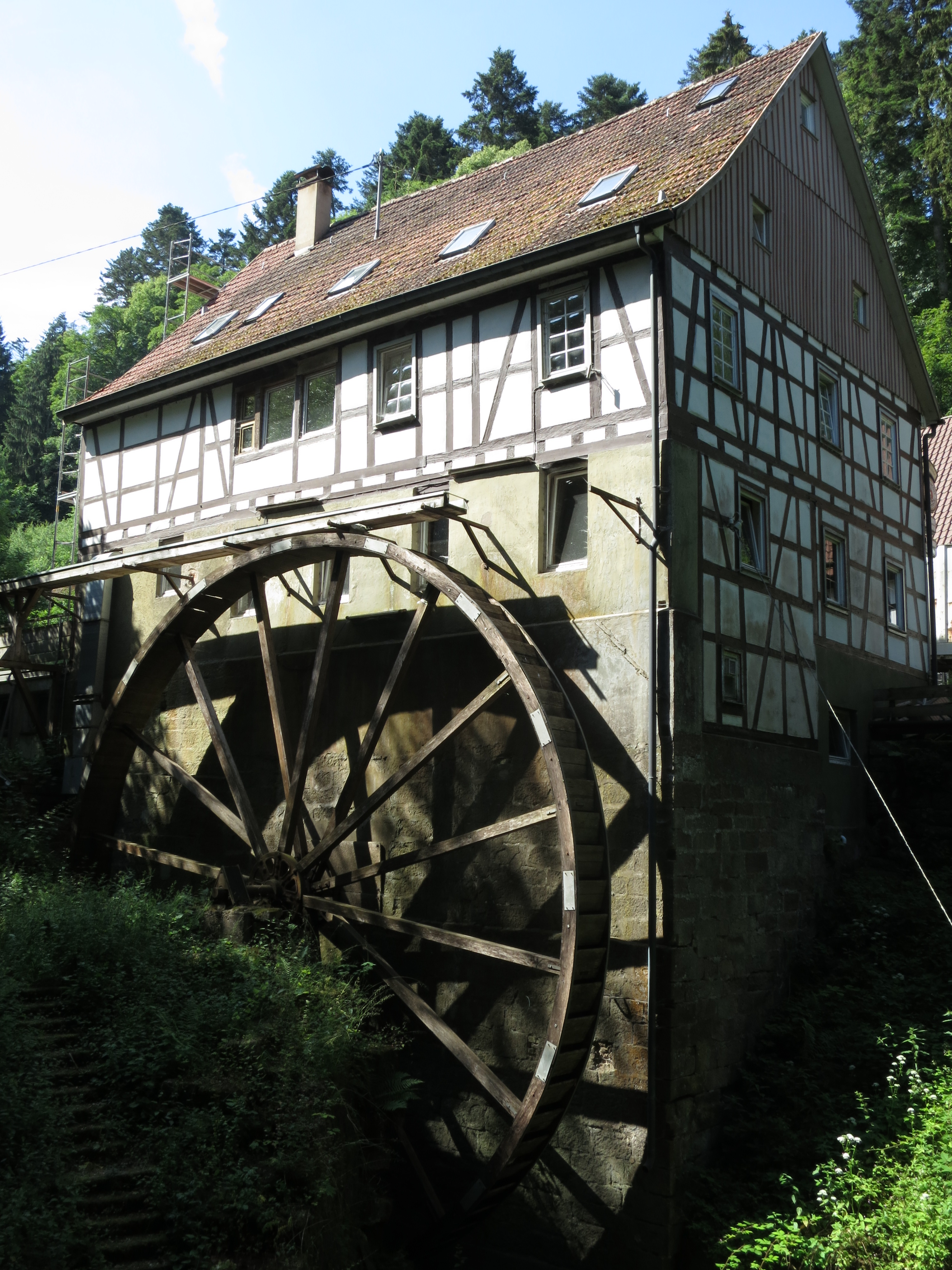 Untere Mühle mit Wasserrad im Schleiftal bei Calw.